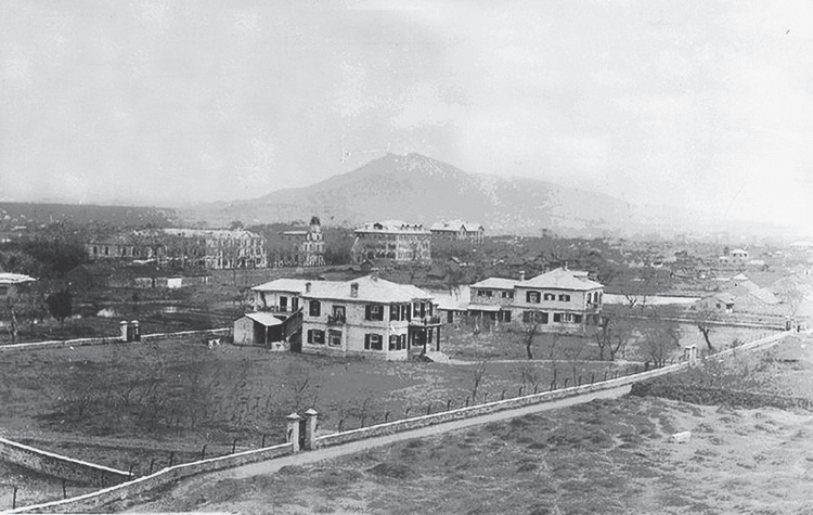 金陵中学校园远眺，照片中前部建筑为今金陵神学院，中部建筑群为金陵大学附属中学建筑群，从左往右分别是西课楼、口字楼、钟楼、小礼堂、东课楼。再右侧为汇文女中（今人民中学）建筑。正后方背景为紫金山。本图片来自美国耶鲁大学神学院图书馆的老照片。 （1966届校友陈农恩提供）